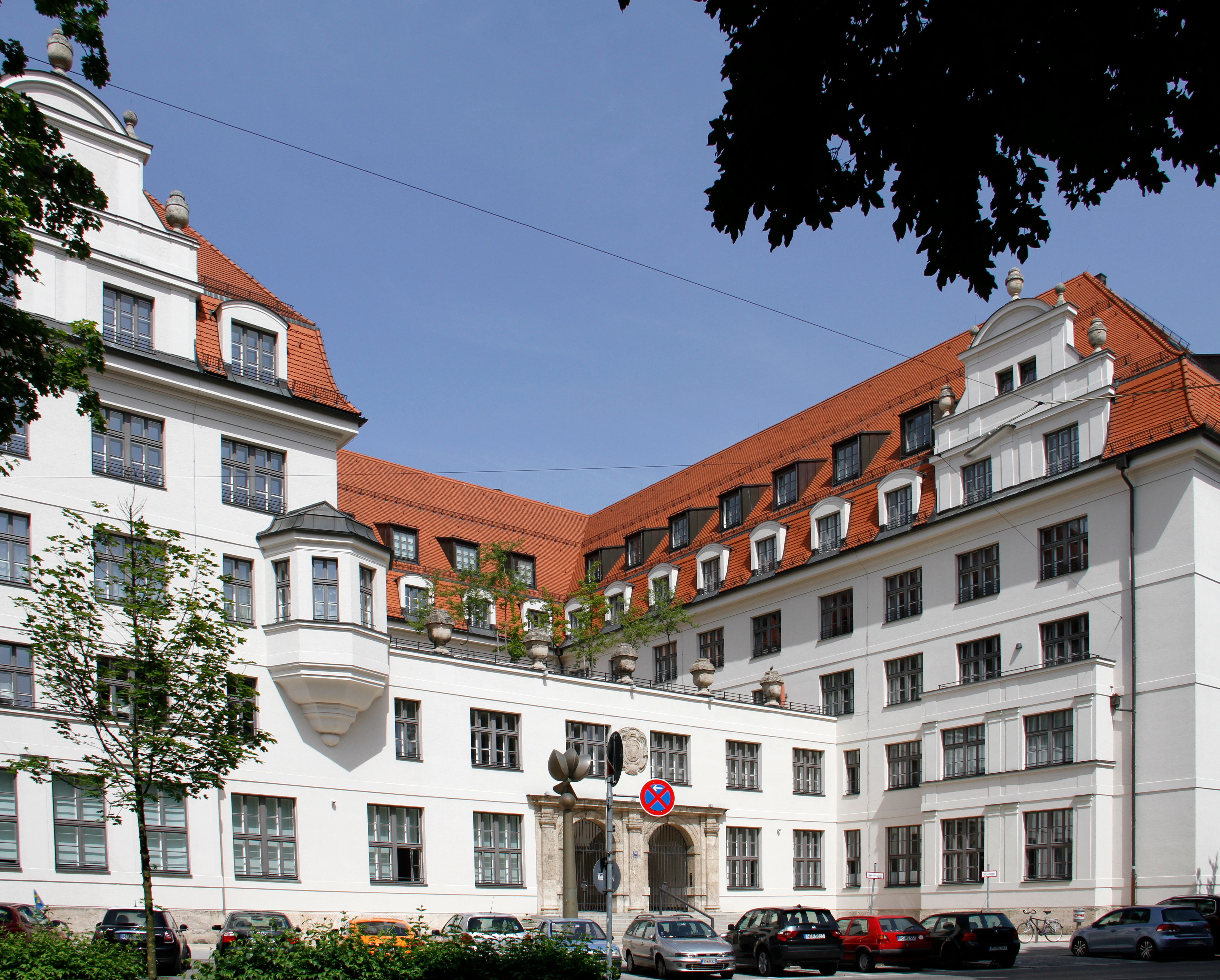 Thalkirchner Straße 54-60, München. Ehemaliges städtisches Arbeitsamt, errichtet 1912/13 von Hans Grässel. Umgebaut als Wohngebäude durch Phillip Starck.